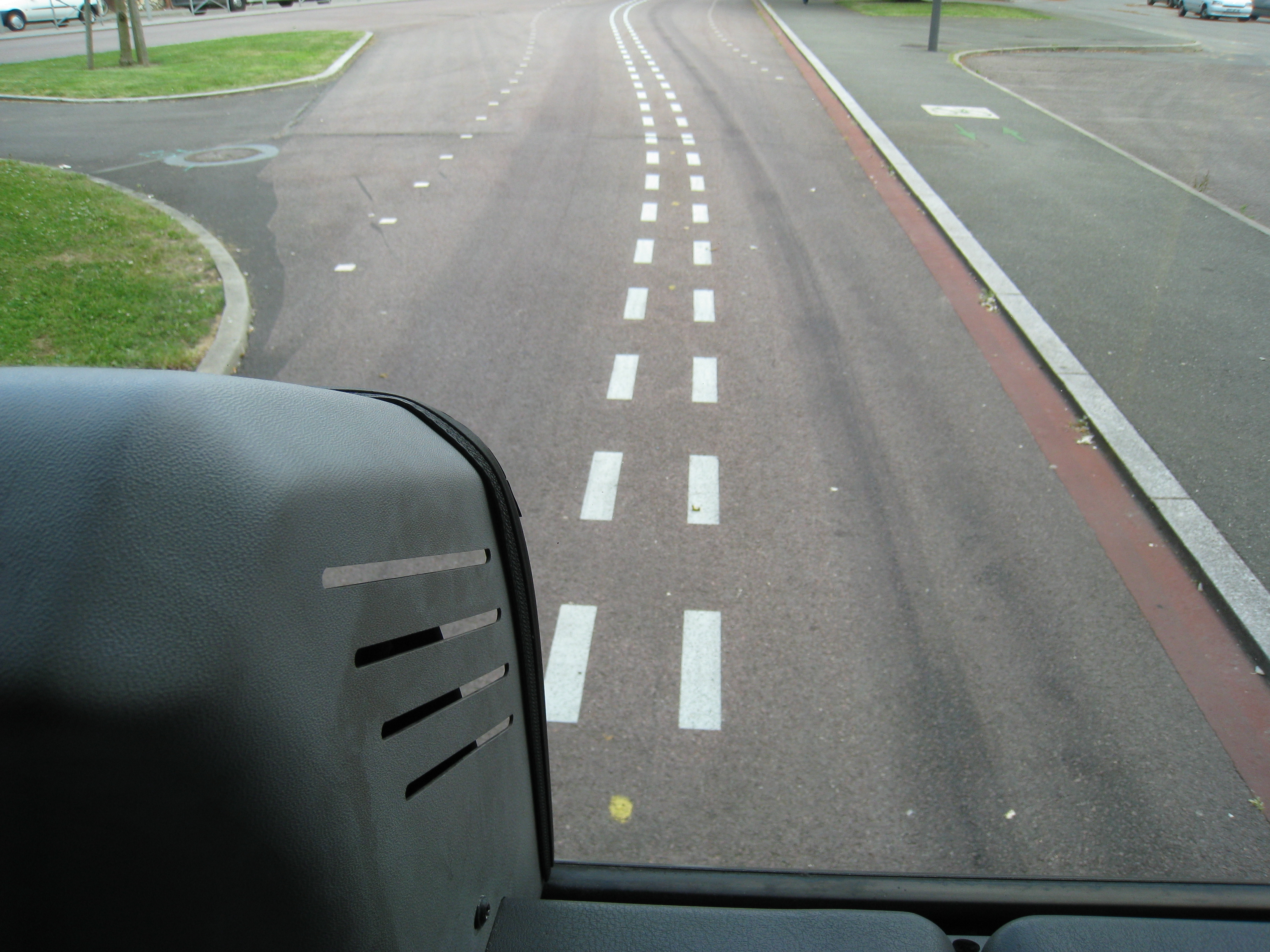 Agora L TEOR suivant les lignes de guidage optique. Photo de Magnum